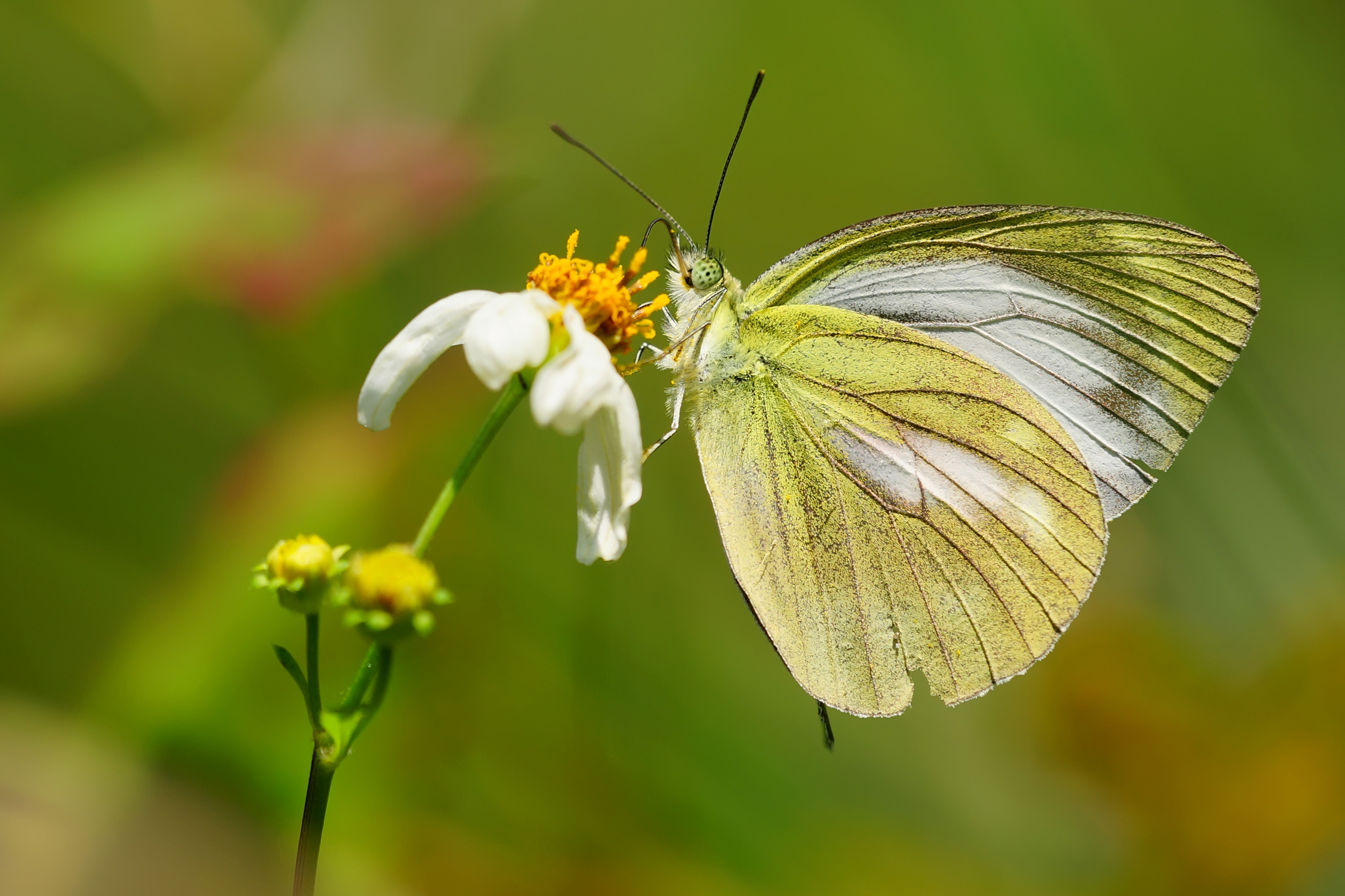 淡褐脈粉蝶 Cepora nadina eunama